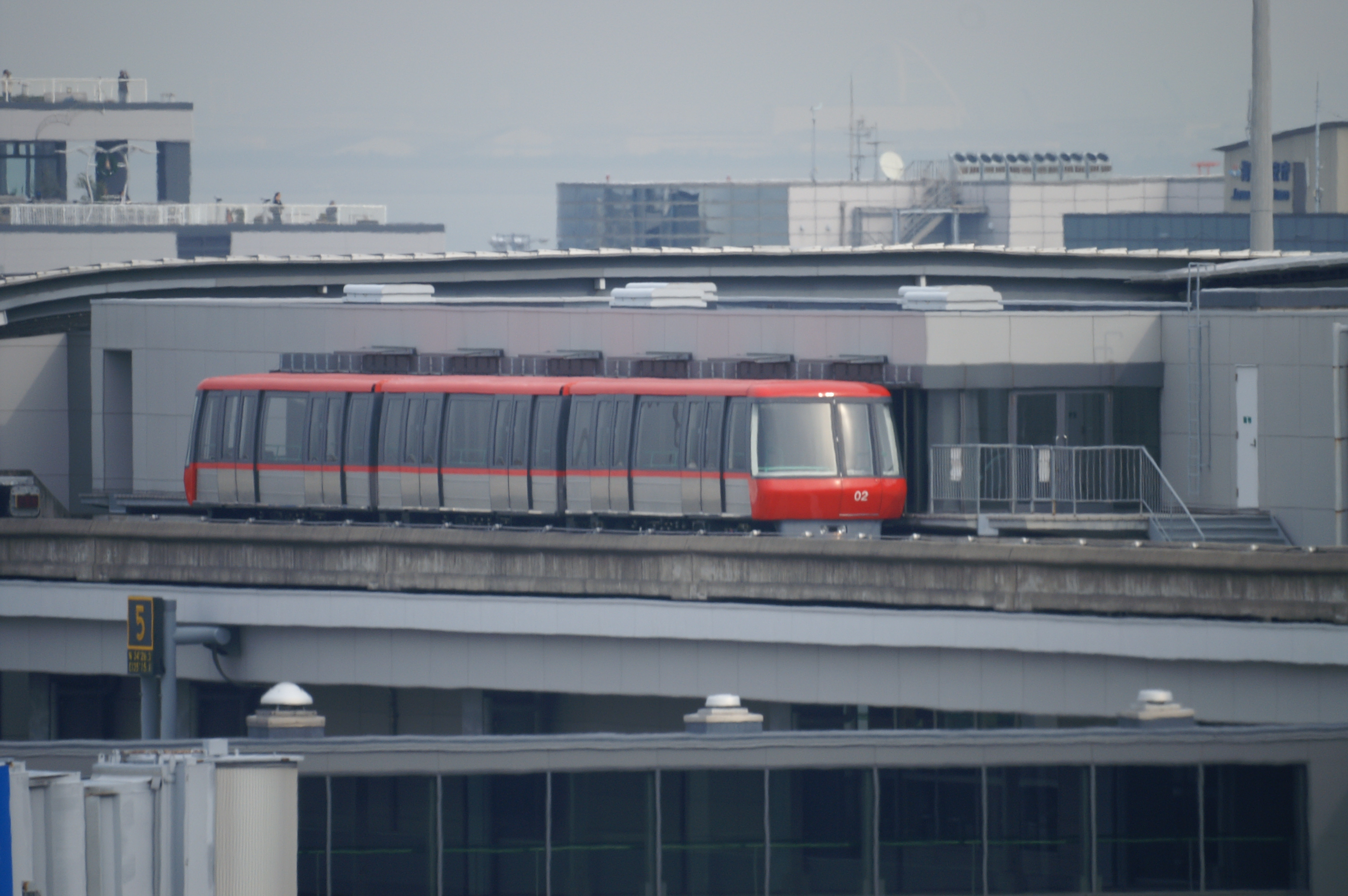 北ウイング先端駅に停車中のウイングシャトル。 (2006/11/22 Kansai International Airport, Osaka, JAPAN)